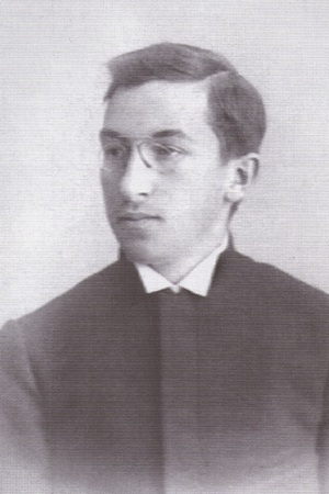 Алексе́й Ива́нович Абрико́сов (1875—1955 года) — российский и советский врач-патологоанатом. Академик АН СССР (1939 год), академик АМН СССР (1944 год). Герой Социалистического Труда (1945). Лауреат Сталинской премии первой степени.